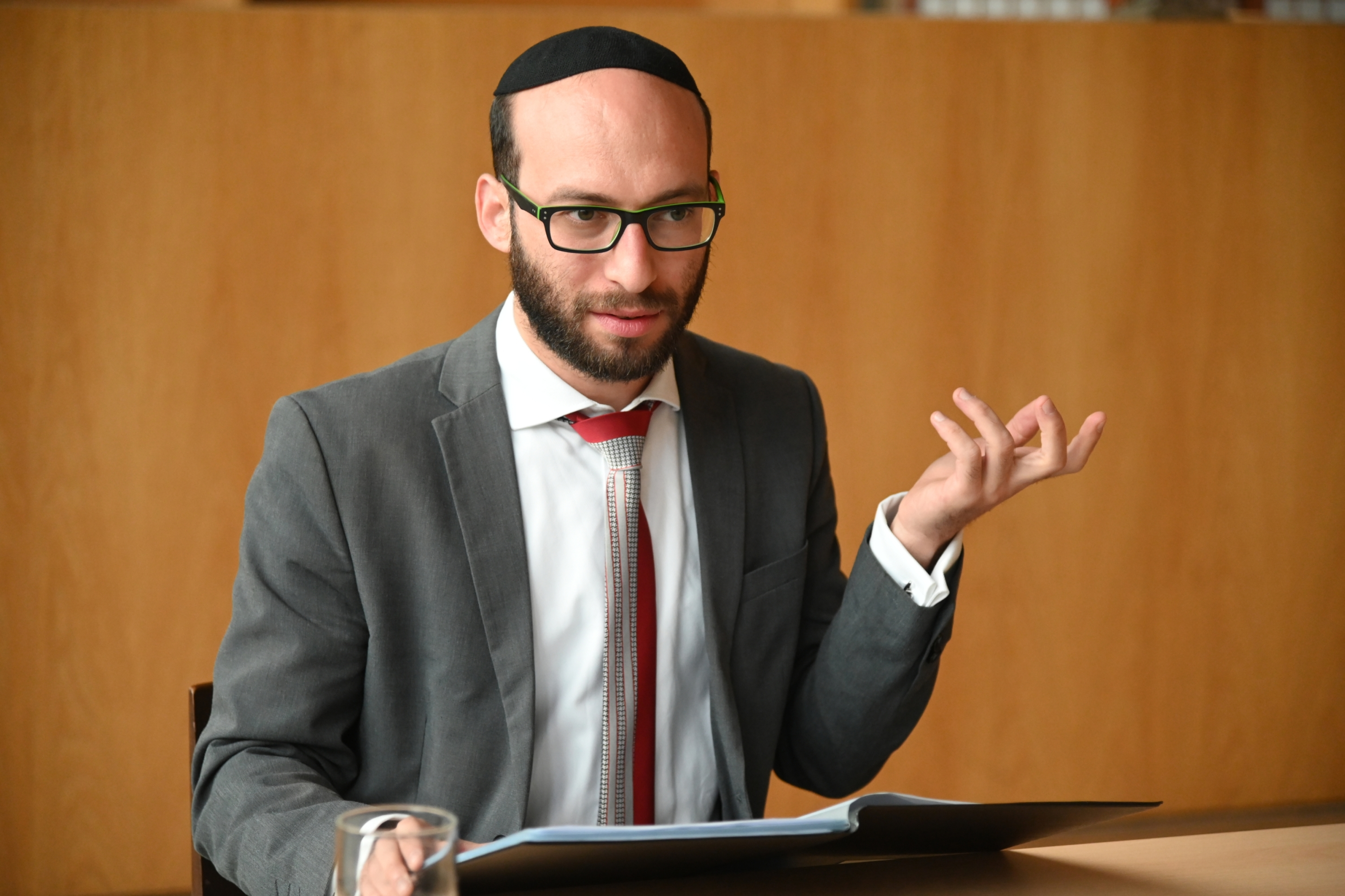 Aktiva Weingarten 2019 in der Jüdischen Synagoge in Dresden